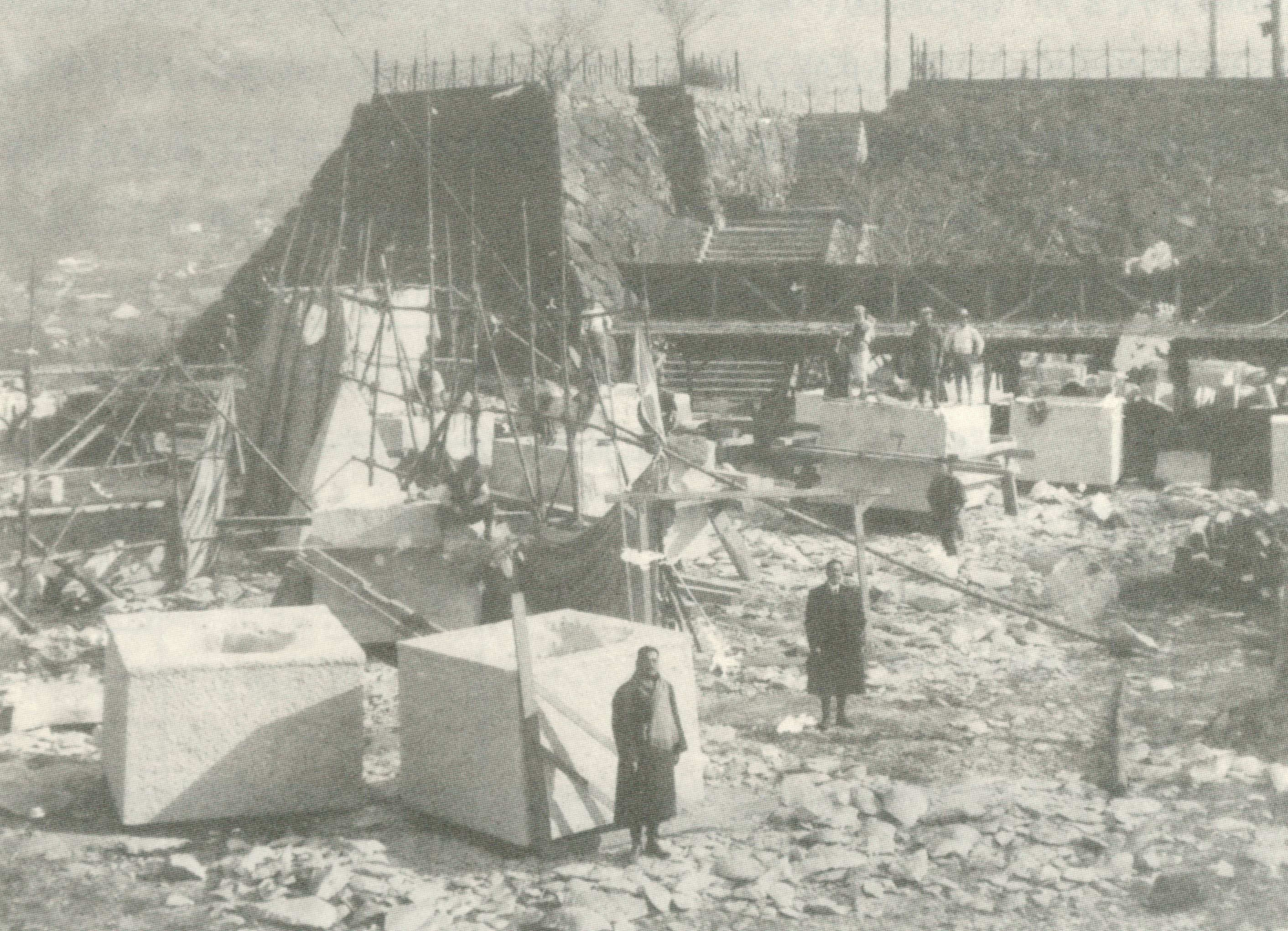 山梨県・甲府城址に建設された「謝恩碑」の工事風景。